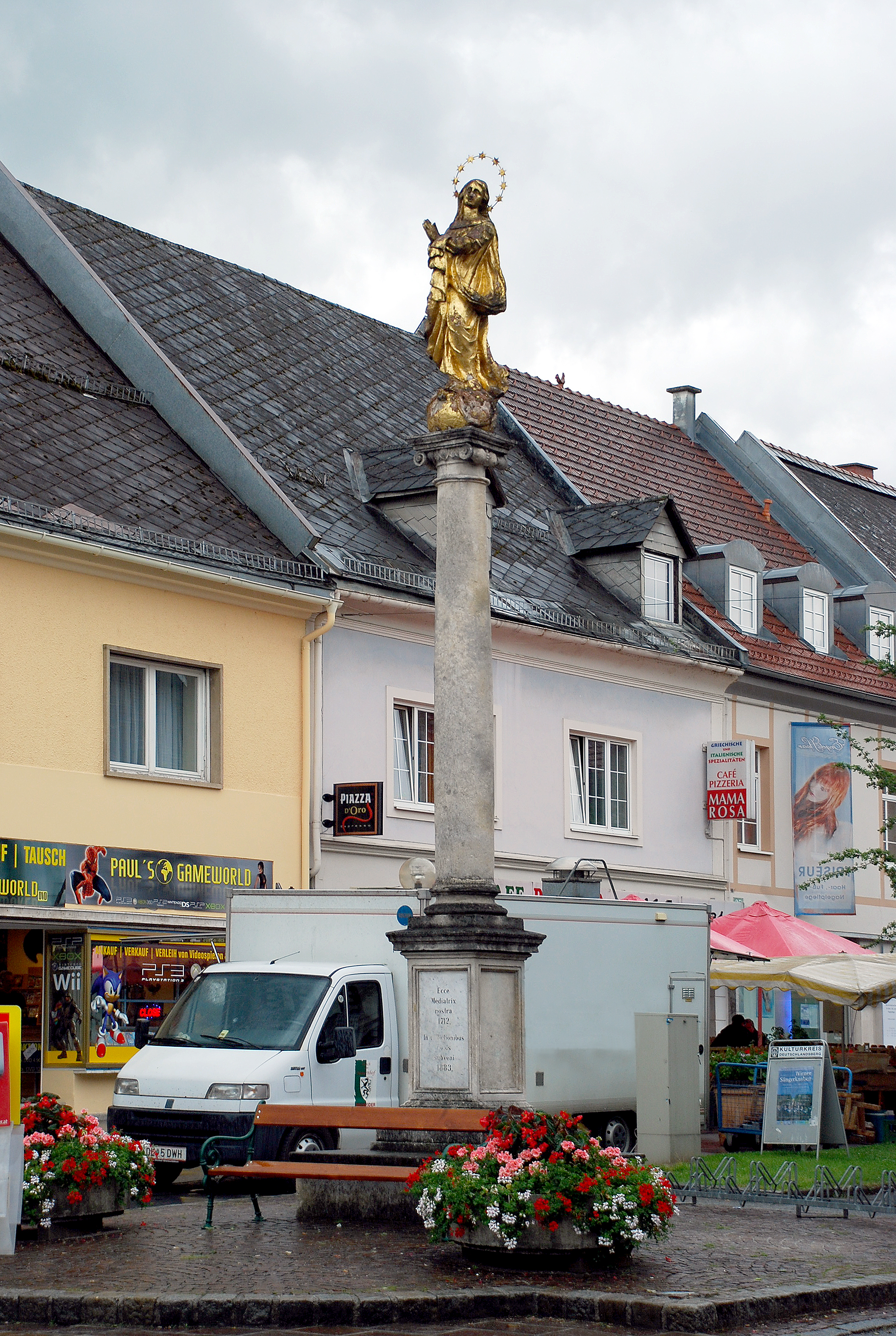 Deutschlandsberg, Steiermark, Österreich: Hauptplatz Marienstatue